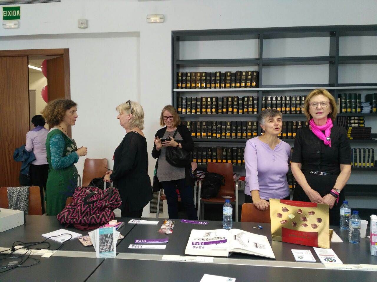 Diversas fotos del editatón organizado por Wikimedia España y el Departamento de Arqueología, de la Facultad de Historia y Geografía de la Universidad de Valencia, el 8 de marzo de 2017.